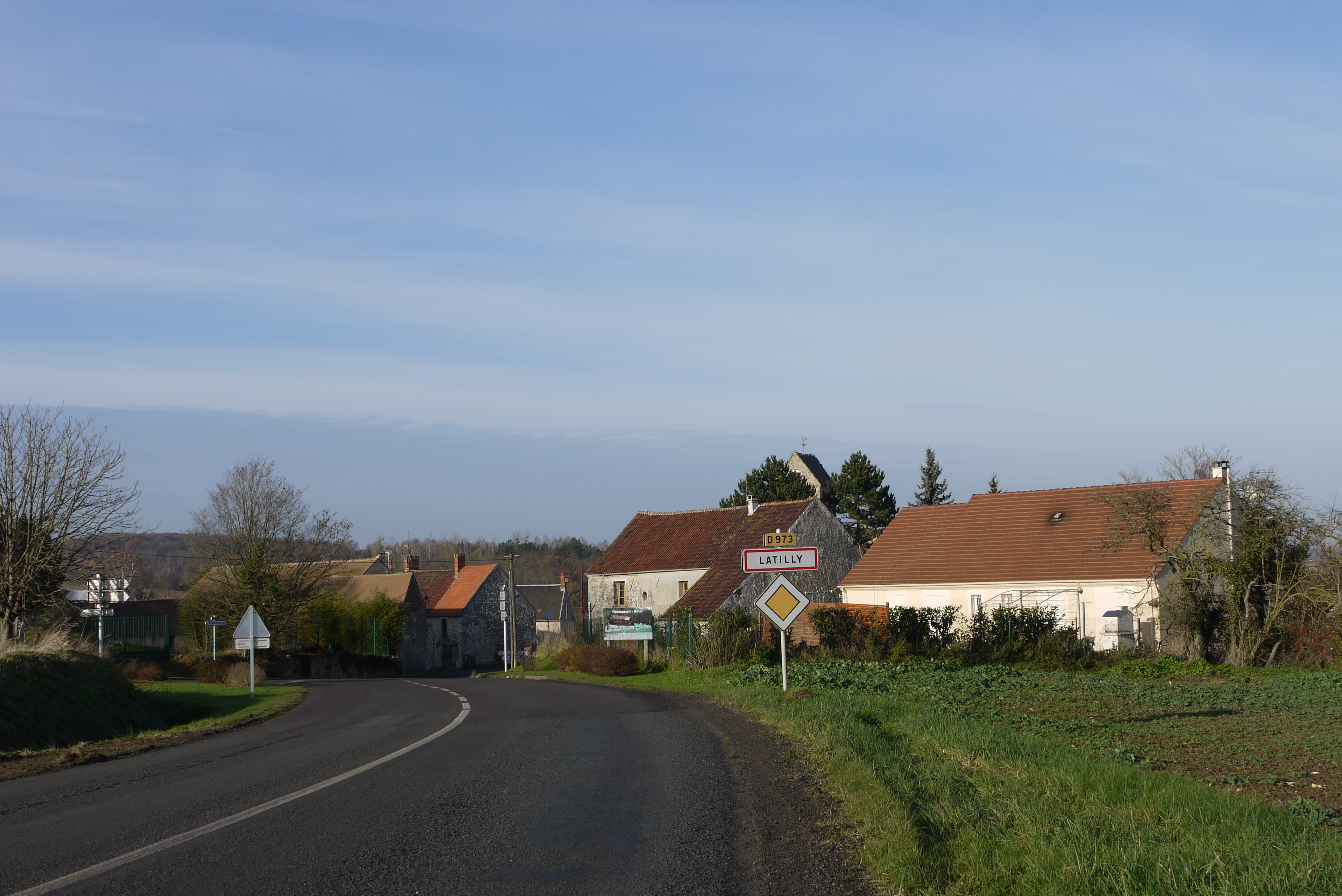 L'entrée de Latilly par la D973